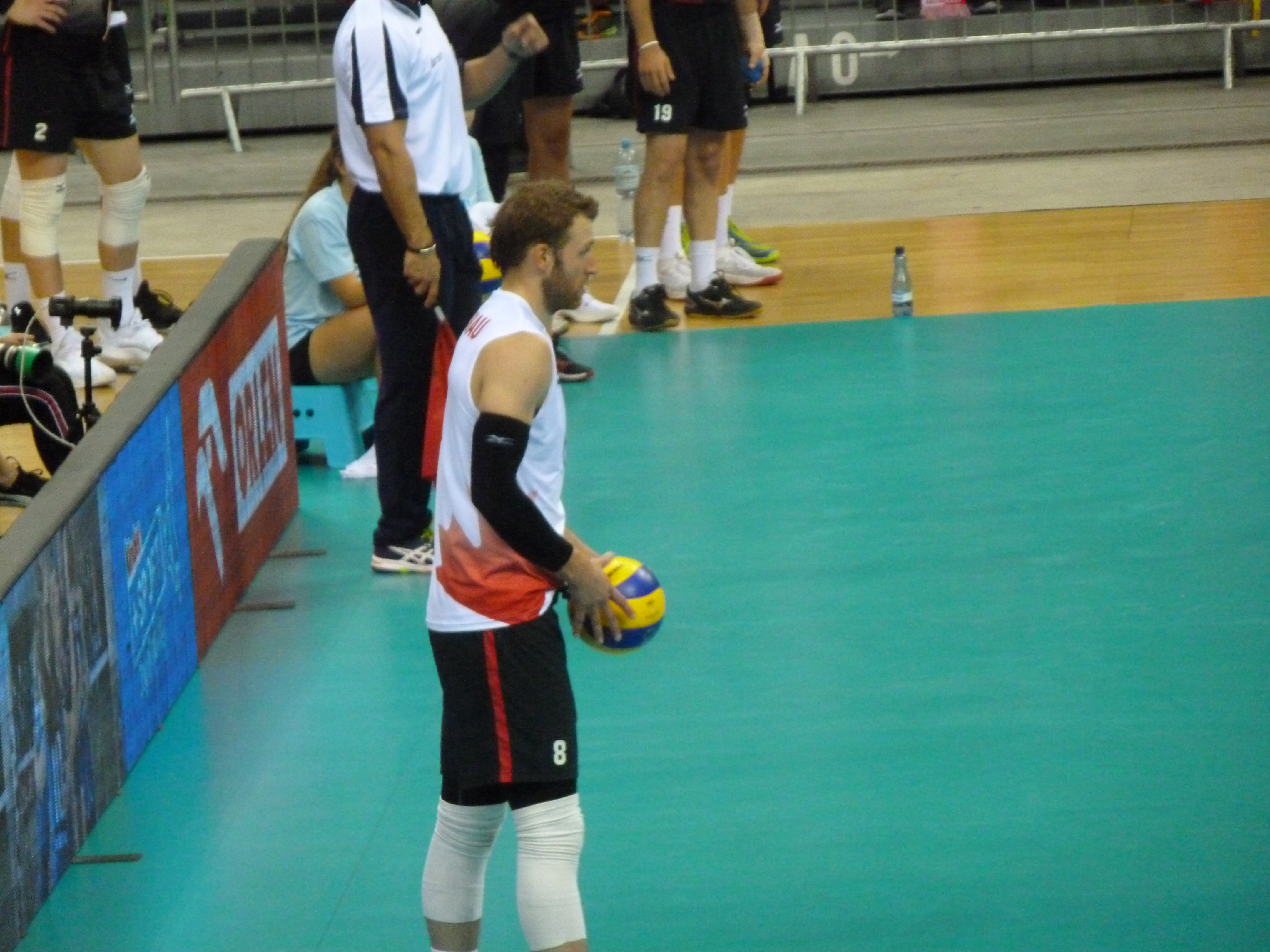 Zdjęcie zrobione podczas Memoriału Huberta Jerzego Wagnera 2018